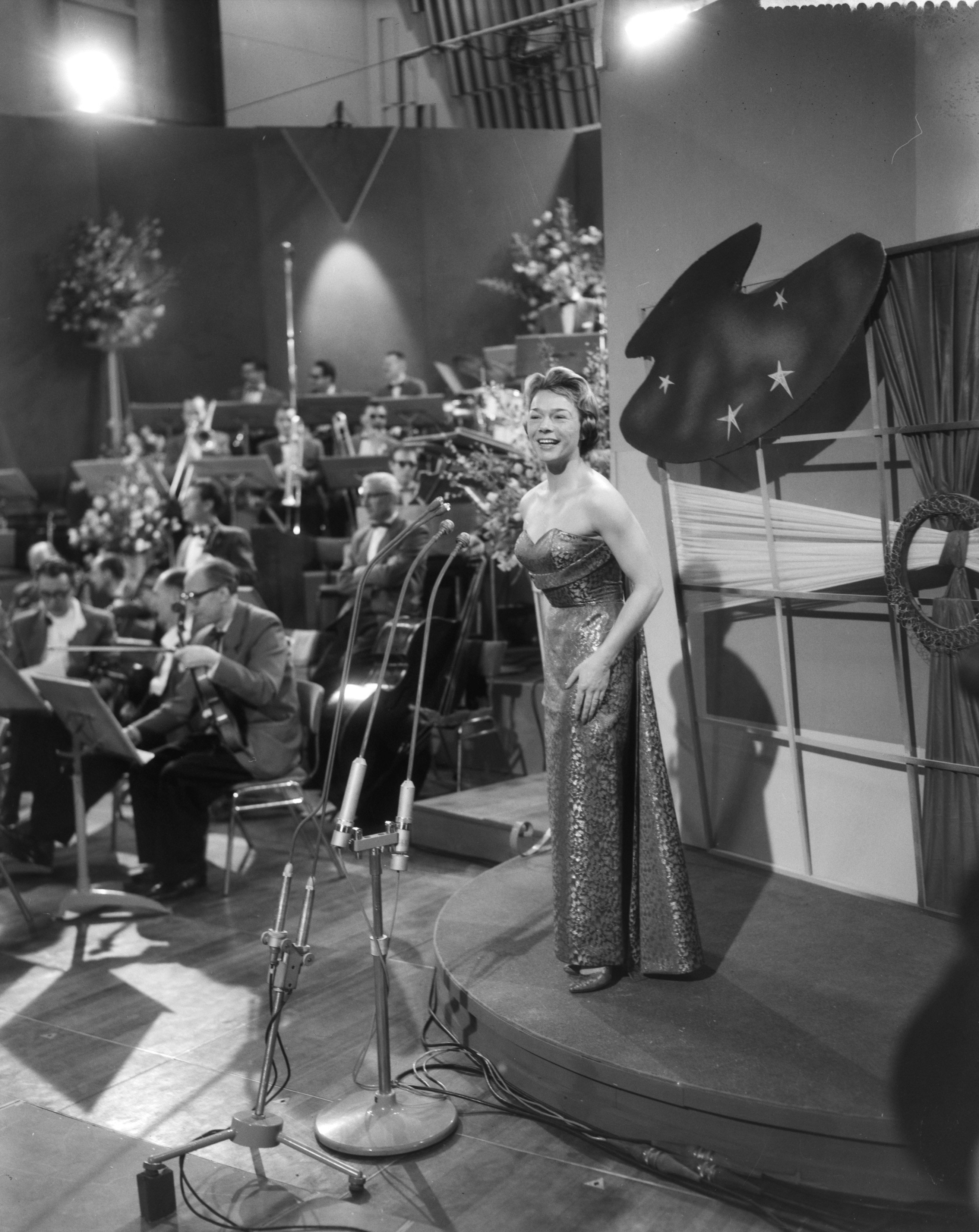 Collectie / Archief : Fotocollectie Anefo Reportage / Serie : [ onbekend ] Beschrijving : Eurovisie Songfestival. Liane Augustin (Oostenrijk) Datum : 11 maart 1958 Locatie : Hilversum Trefwoorden : songfestivals, zangeressen Persoonsnaam : Augustin Liane Fotograaf : Pot, Harry / Anefo Auteursrechthebbende : Nationaal Archief Materiaalsoort : Negatief (zwart/wit) Nummer archiefinventaris : bekijk toegang 2.24.01.04 Bestanddeelnummer : 909-3998